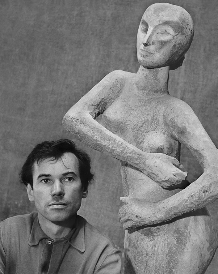 Jan Šplíchal, portrét Františka Pacíka